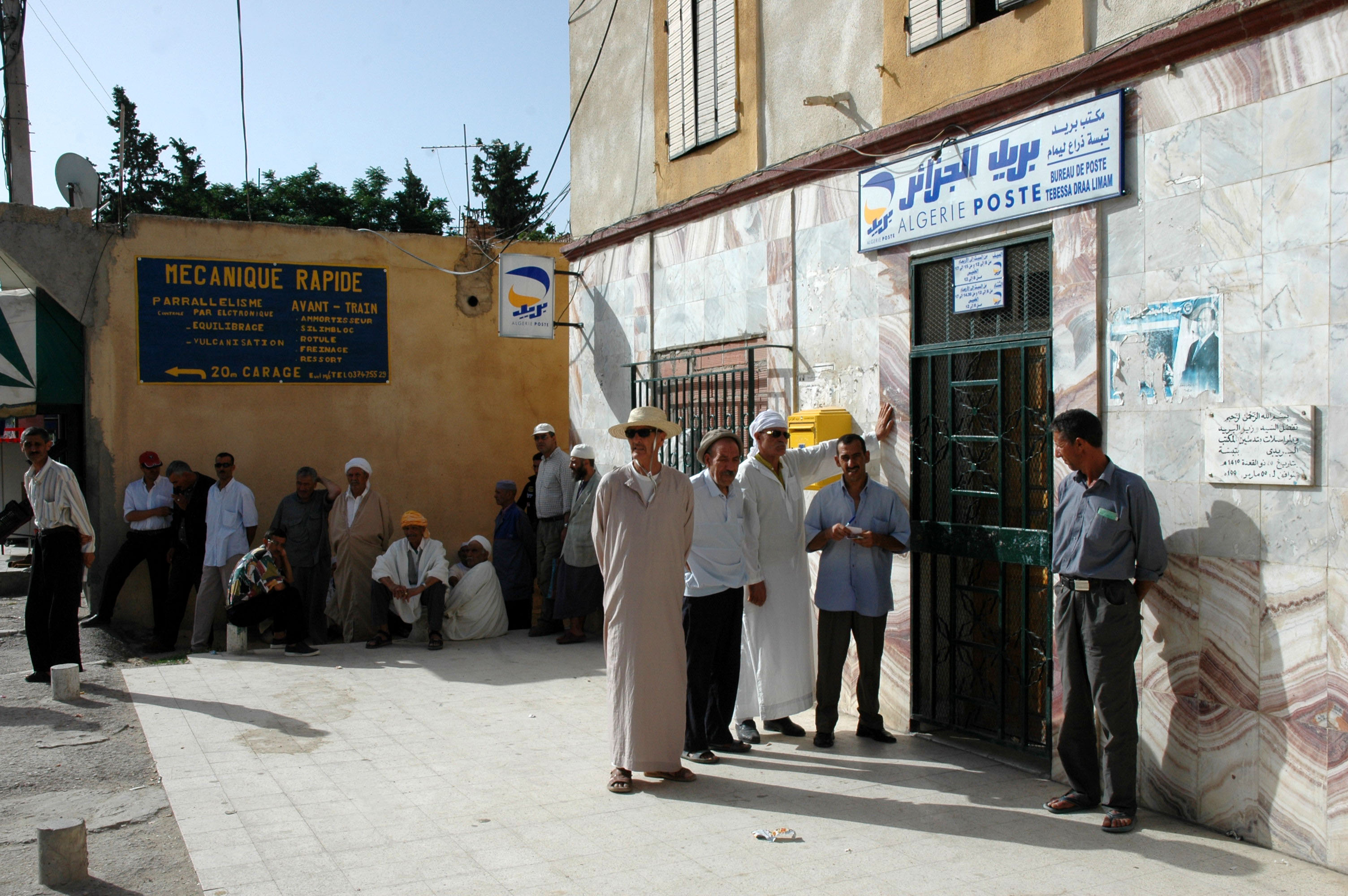 [Magharebia/Hayam El Hadi] As long queues formed outside its offices, Algérie Poste denied responsibility for the lack of currency and blamed the Bank of Algeria. طوابير طويلة تنتظر خارج مكاتب بريد الجزائر لكن هذه الأخيرة تنفي المسؤولية عن نقص السيولة ملقية باللوم على بنك الجزائر Alors que de longues files d'attente se forment à l'extérieur de ses agences, Algérie Poste nie toute responsabilité pour ce manque de liquidités et en rejette la faute sur la Banque d'Algérie. Full story